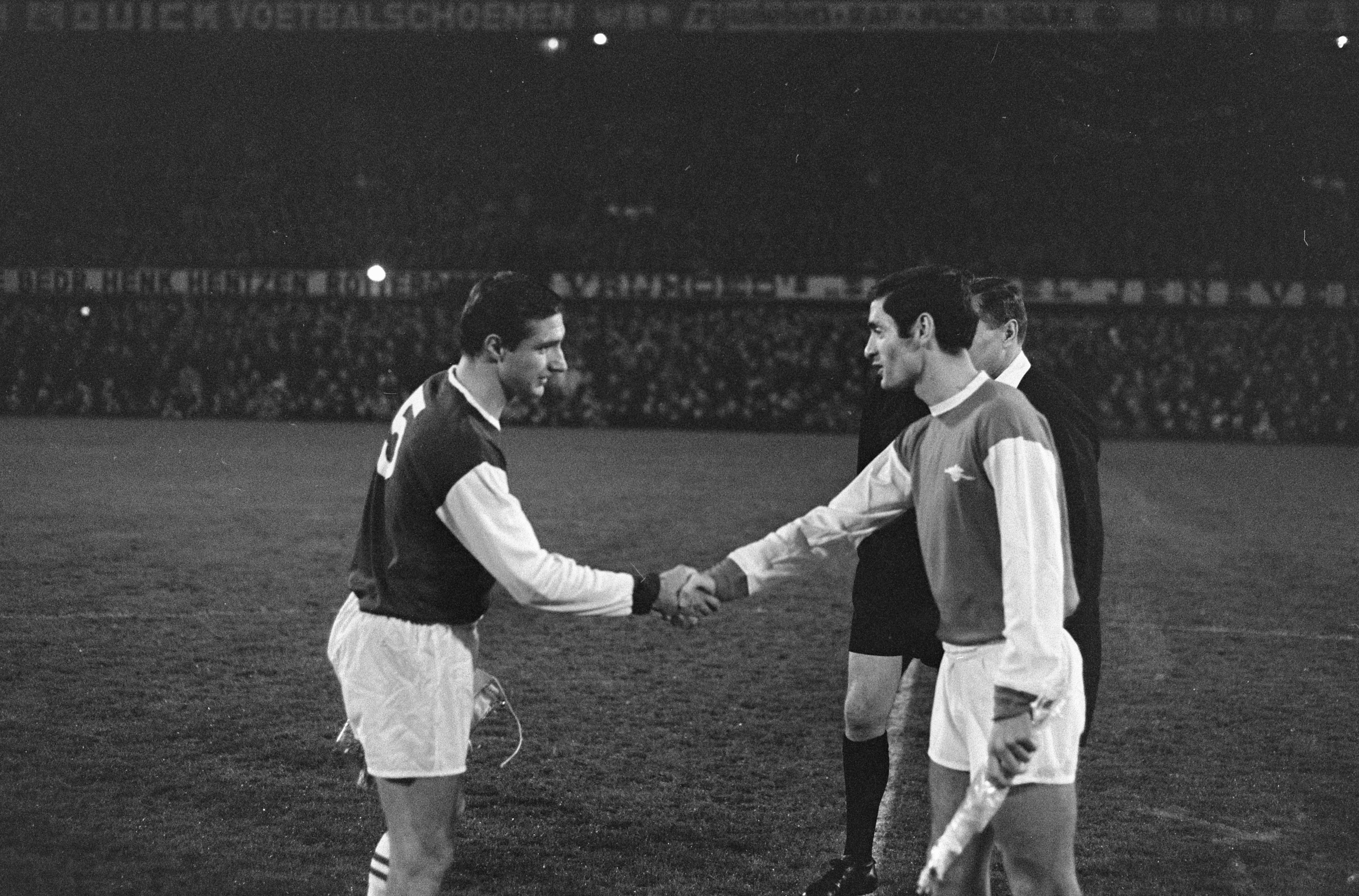 Collectie / Archief : Fotocollectie Anefo Reportage / Serie : Feyenoord tegen Arsenal 3-2 Beschrijving : Cor Veldhoen (links) met Arsenal aanvoerder Frank McLintock tijdens de toss Datum : 14 november 1967 Locatie : Rotterdam, Zuid-Holland Trefwoorden : sport, voetbal Persoonsnaam : McLintock, Frank, Veldhoen, Cor Instellingsnaam : Arsenal, Feyenoord Fotograaf : Kroon, Ron / Anefo Auteursrechthebbende : Nationaal Archief Materiaalsoort : Negatief (zwart/wit) Nummer archiefinventaris : bekijk toegang 2.24.01.05 Bestanddeelnummer : 920-8542